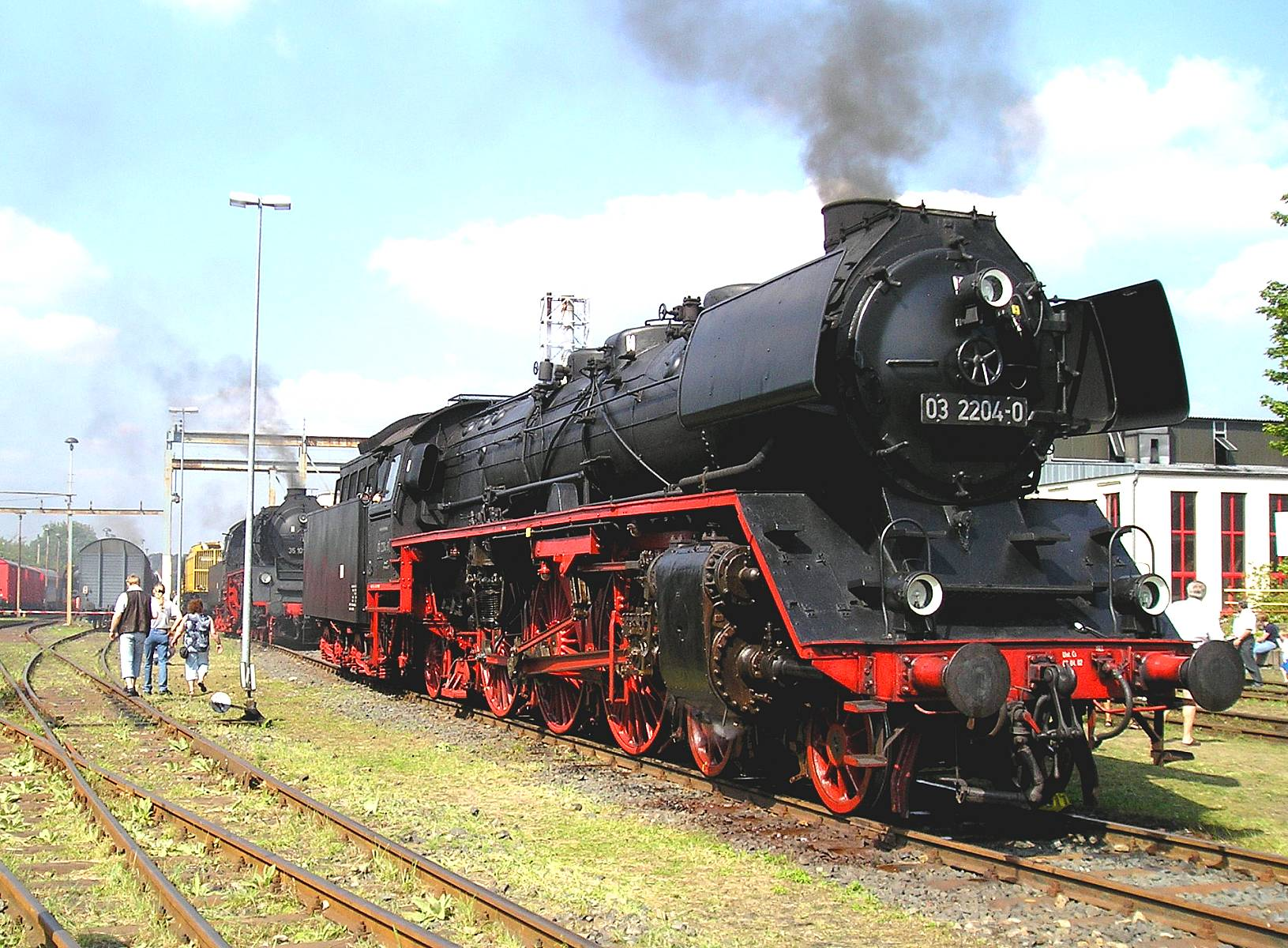 Bei den Meininger Dampfloktagen.